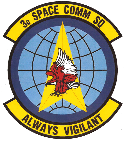 3d Space Comm Squadron, Kapaun AS, Germany